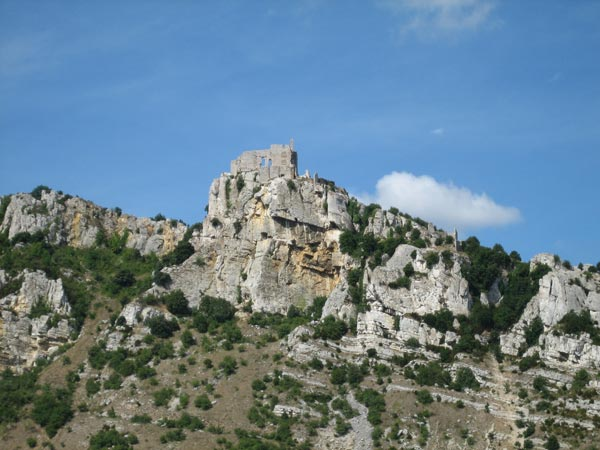 Façade est du château de Crussol (07); il s'agit de la faÃ§ade visible depuis Valence (26), mais la photo est prise depuis l'ArdÃ¨che. Source : LoÃ¯ck Magnin (Celui)